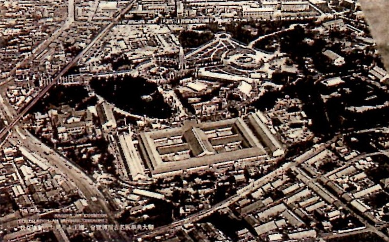 1928年に鶴舞公園で開催された御大典奉祝名古屋博覧会。1930年竣工の名古屋市公会堂は工事中。本館敷地は後にグラウンドとなる。